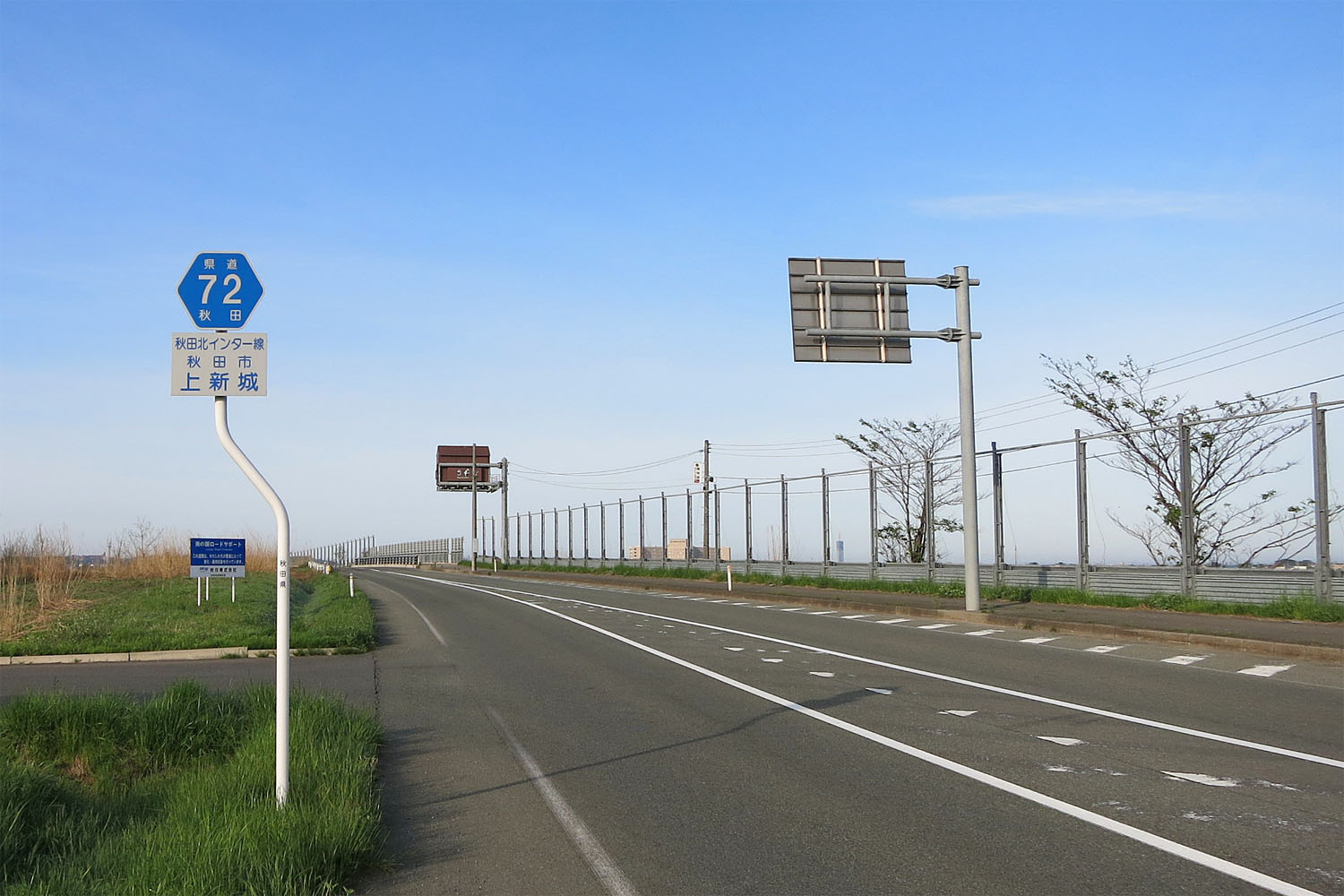 秋田県道72号線、秋田北IC近くのローソン前にて撮影